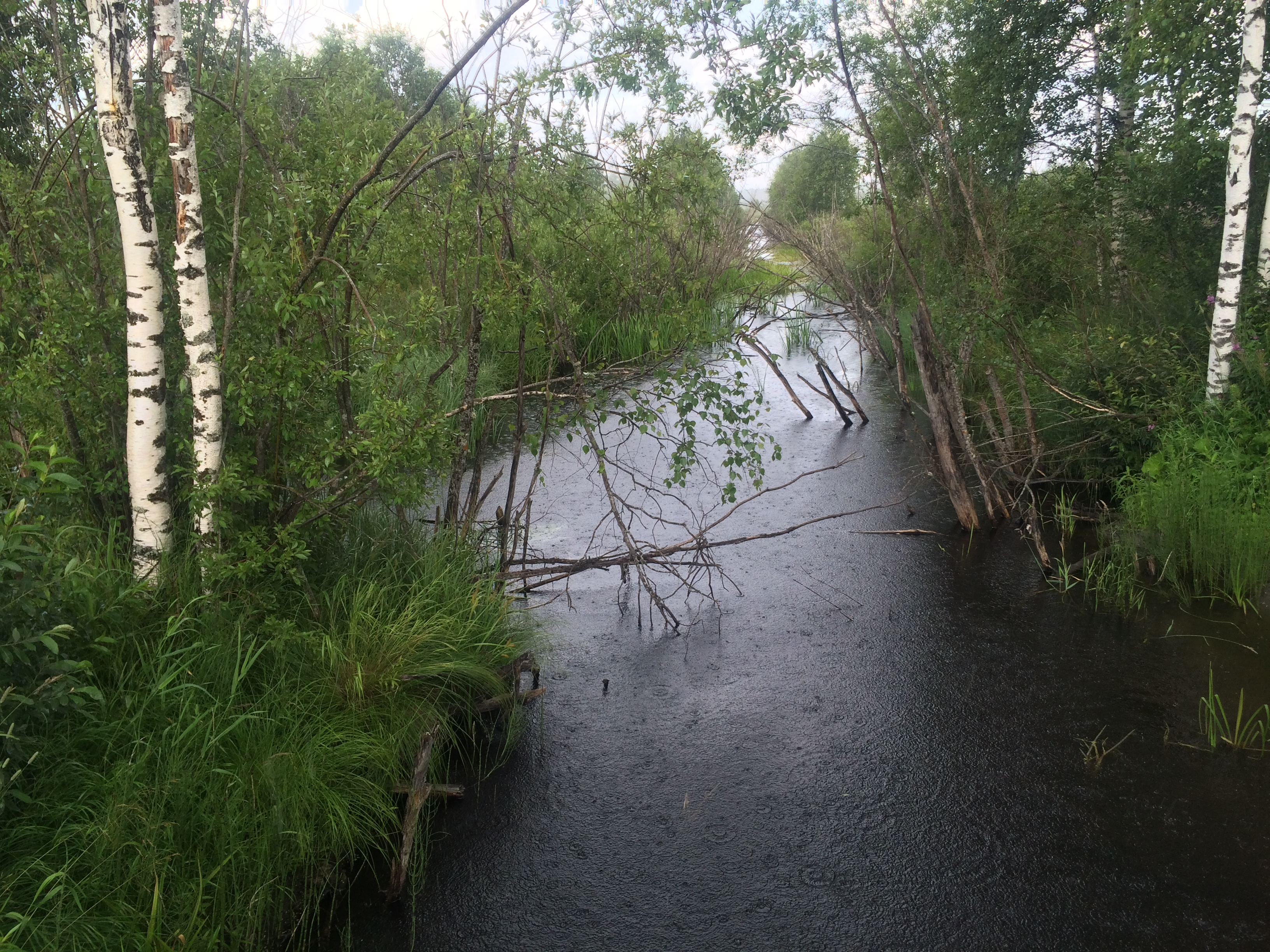 ручей Аза